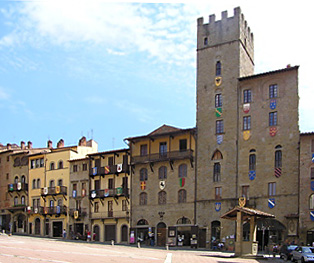 Schöne Patrizierhäuser an der Piazza Grande in Arezzo